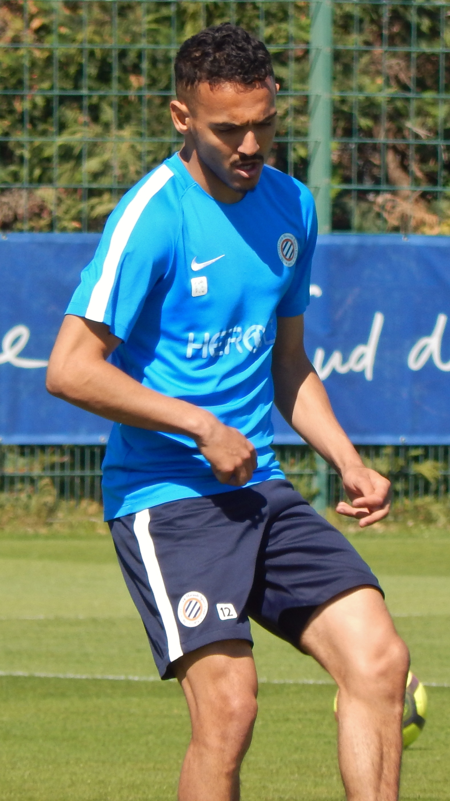 Bilal Boutobba à l'entrainement, mai 2019.